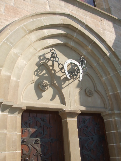 Pfarrkirche St. Leonhard, Stödtlen, OstalbkreisHufeisen am Kirchenportal